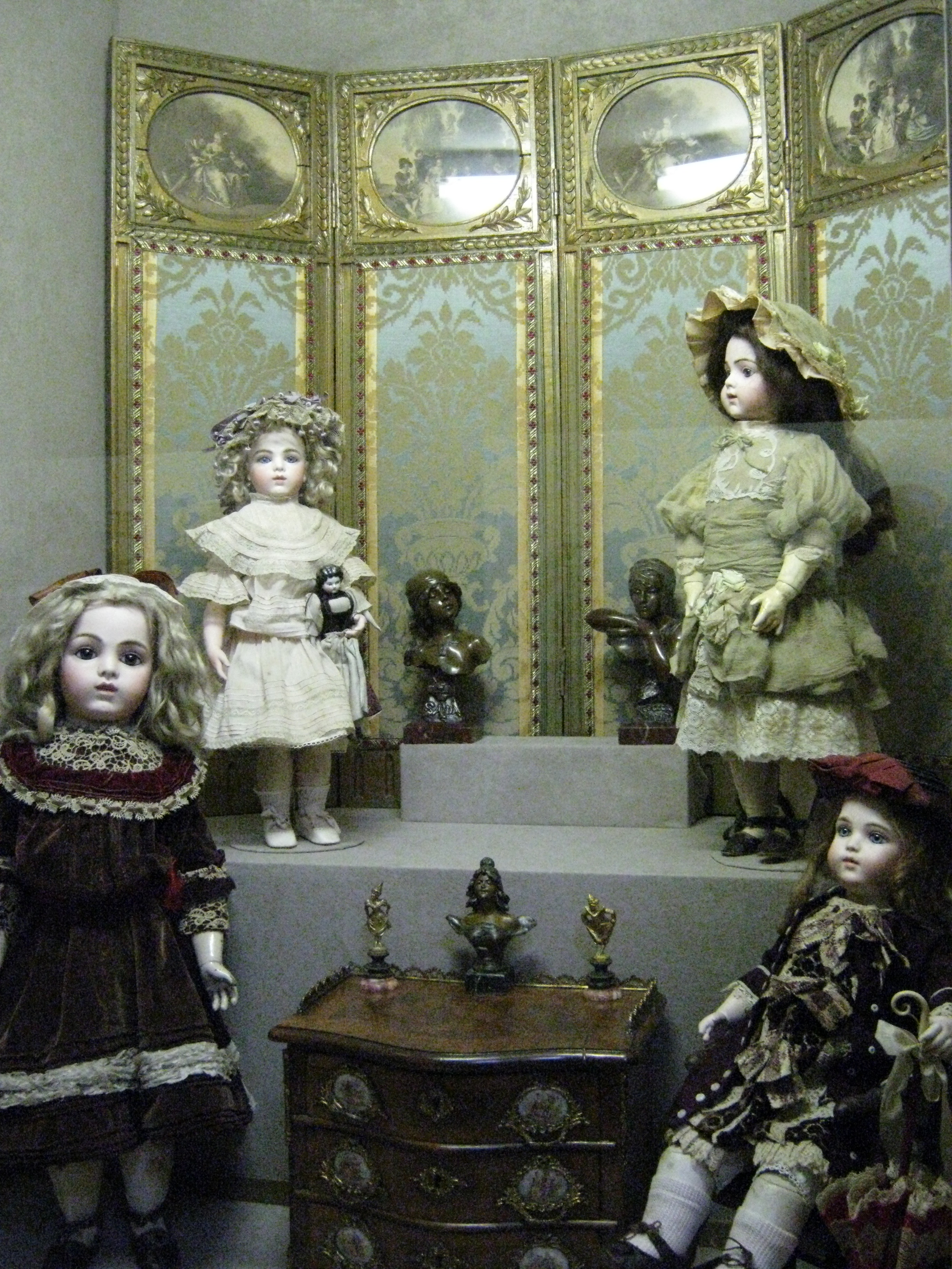 John Selbach Museum Poppenvitrine Bru-viertal